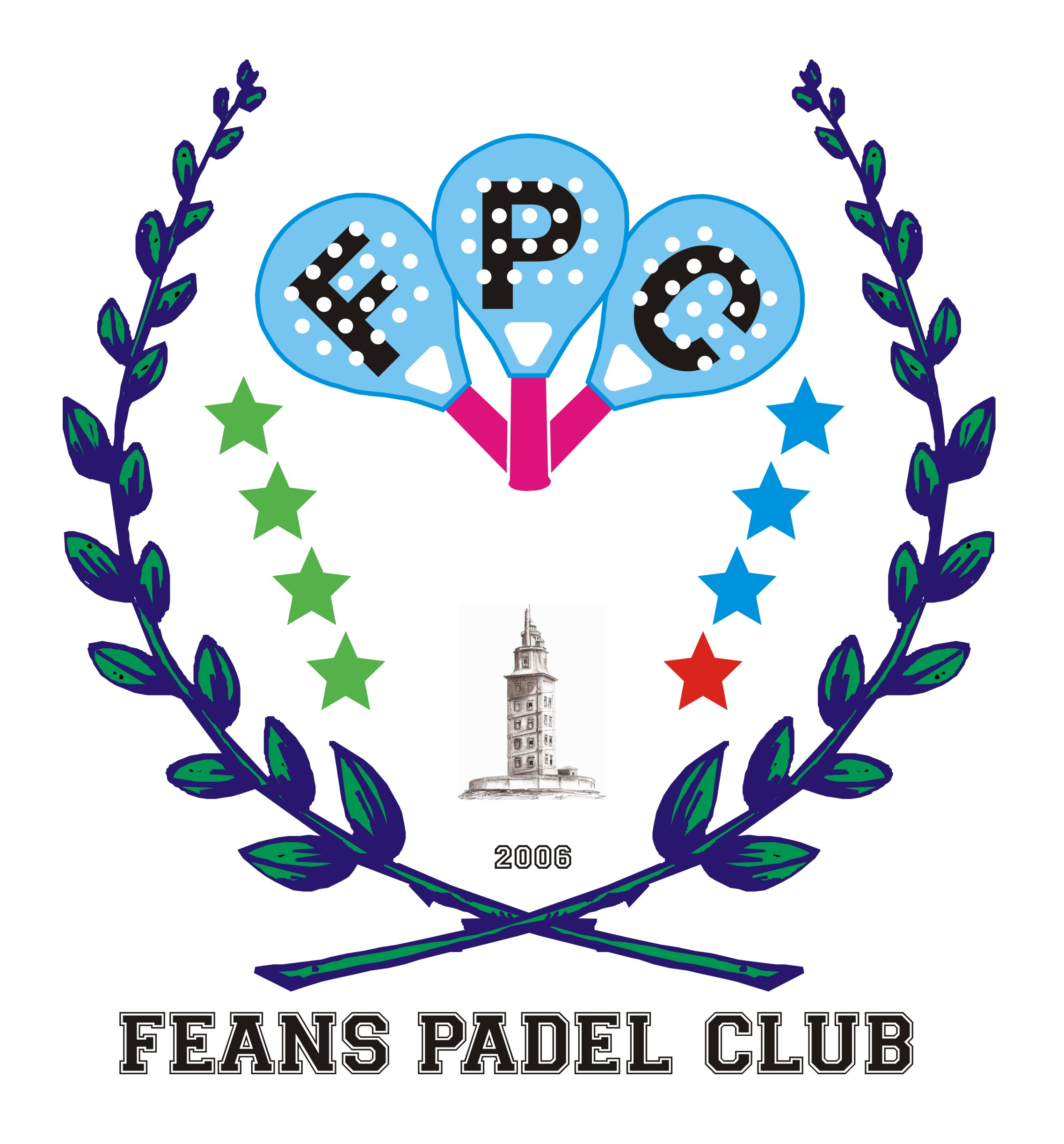 Escudo de Feans Padel Club